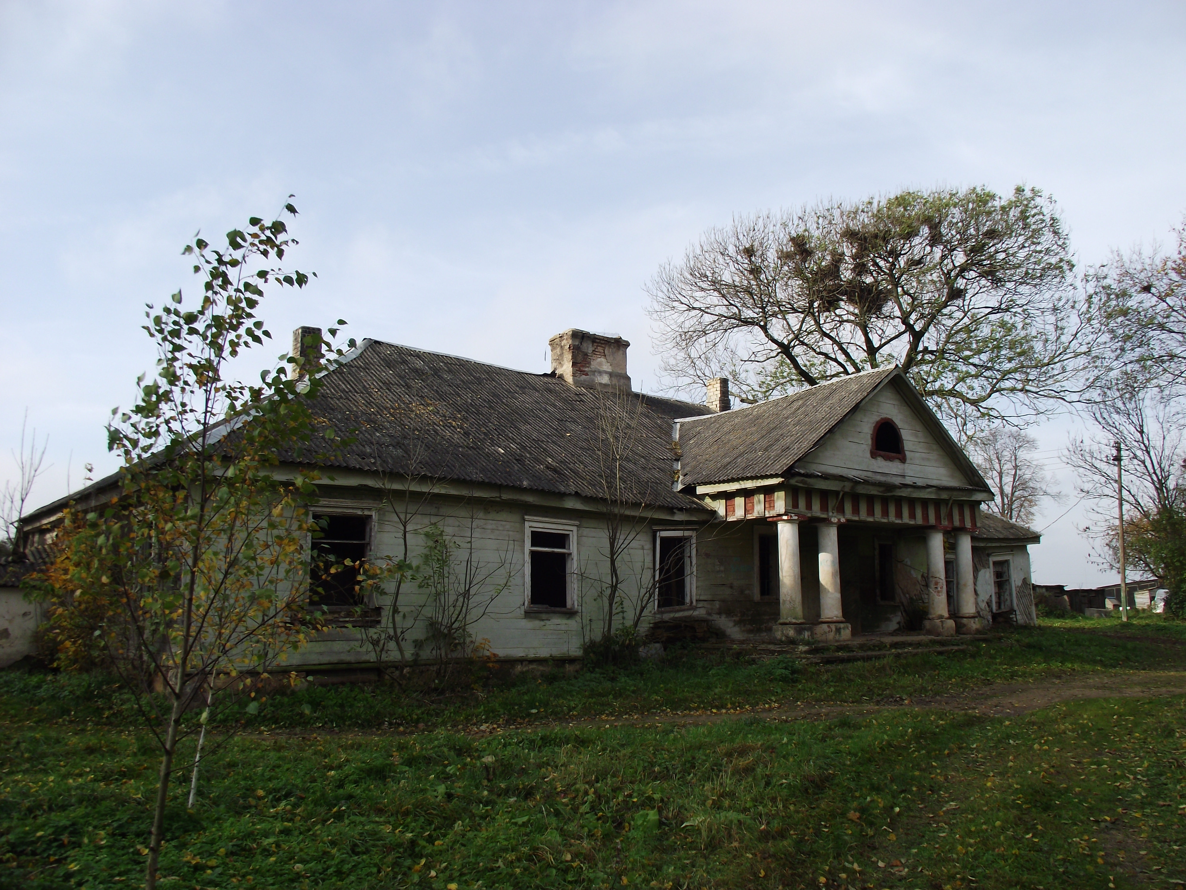 Laibiskiai manor (Ukmerge distric)